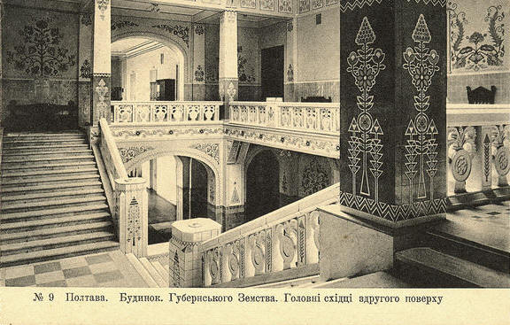 Будинок Полтавського губернського земства, головні східці із другого поверху, початок 20 століття. Видання паперового магазину І. А. Дохмана